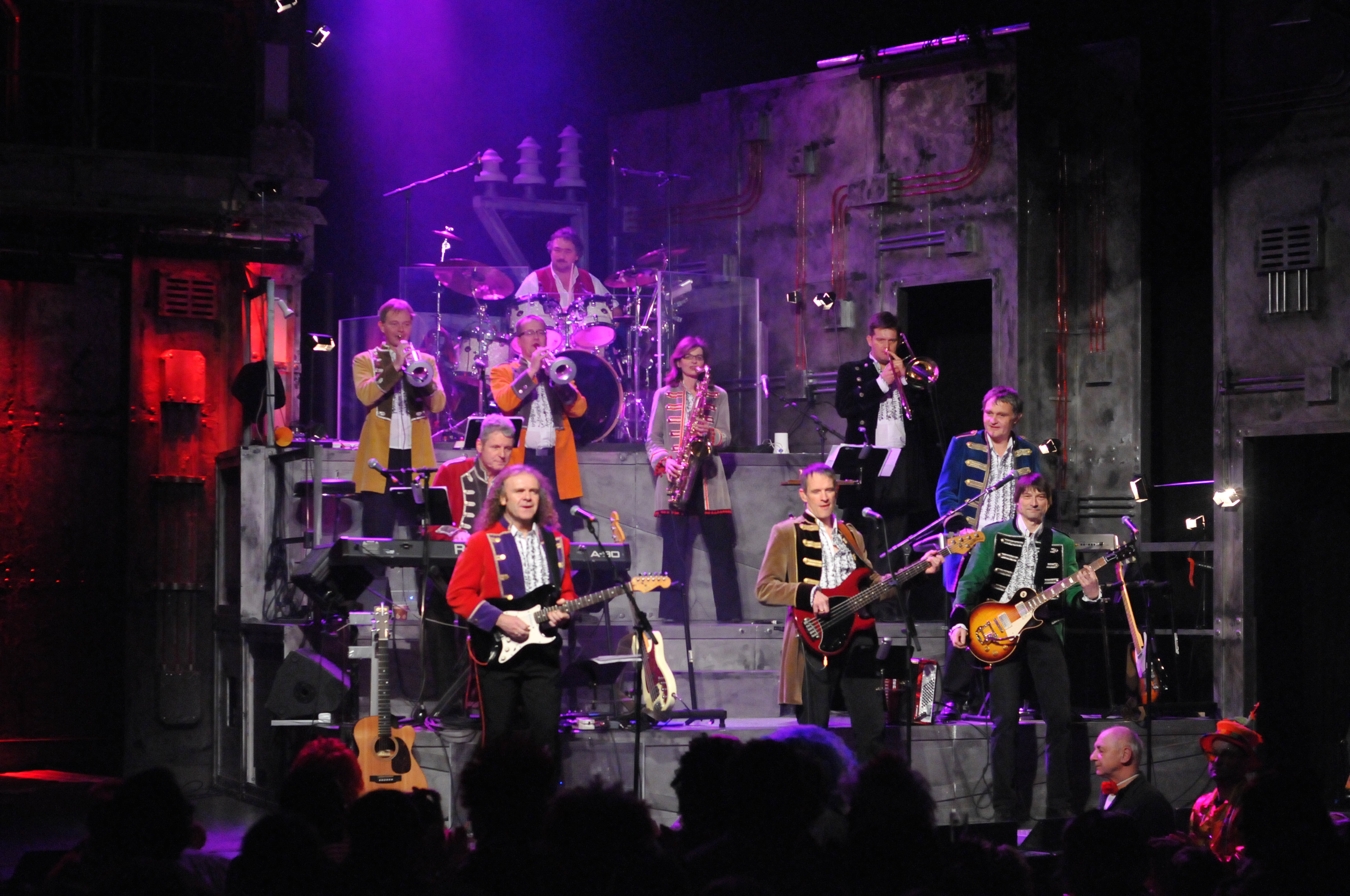 Köbes Underground auf der Stunksitzung vom 20.1.2011